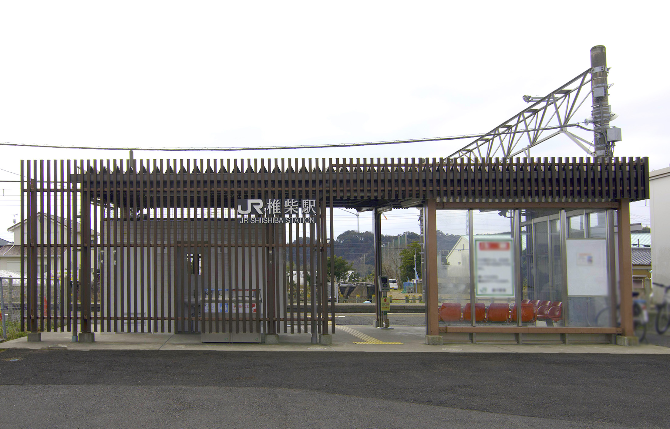 東日本旅客鉄道株式会社成田線椎柴駅駅舎